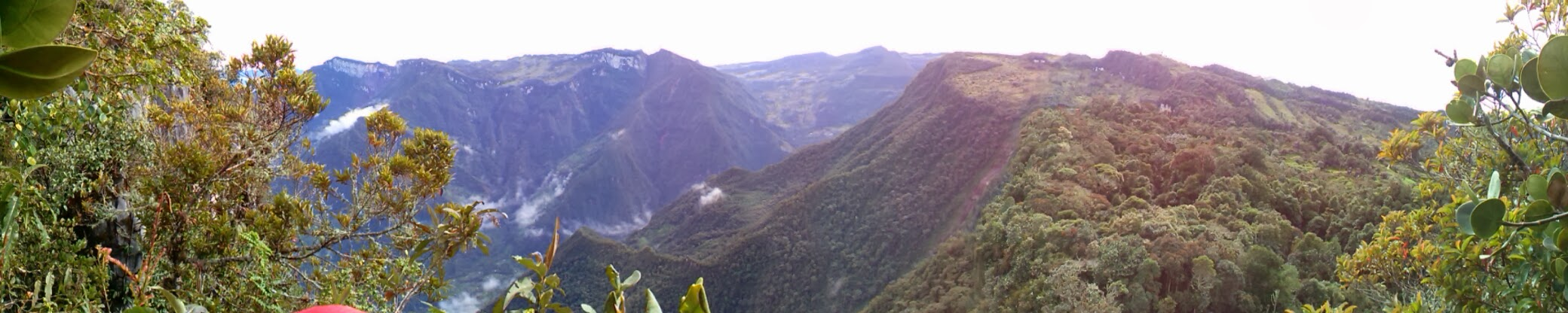 uno de los lugares emblemáticos de Sabanagrande